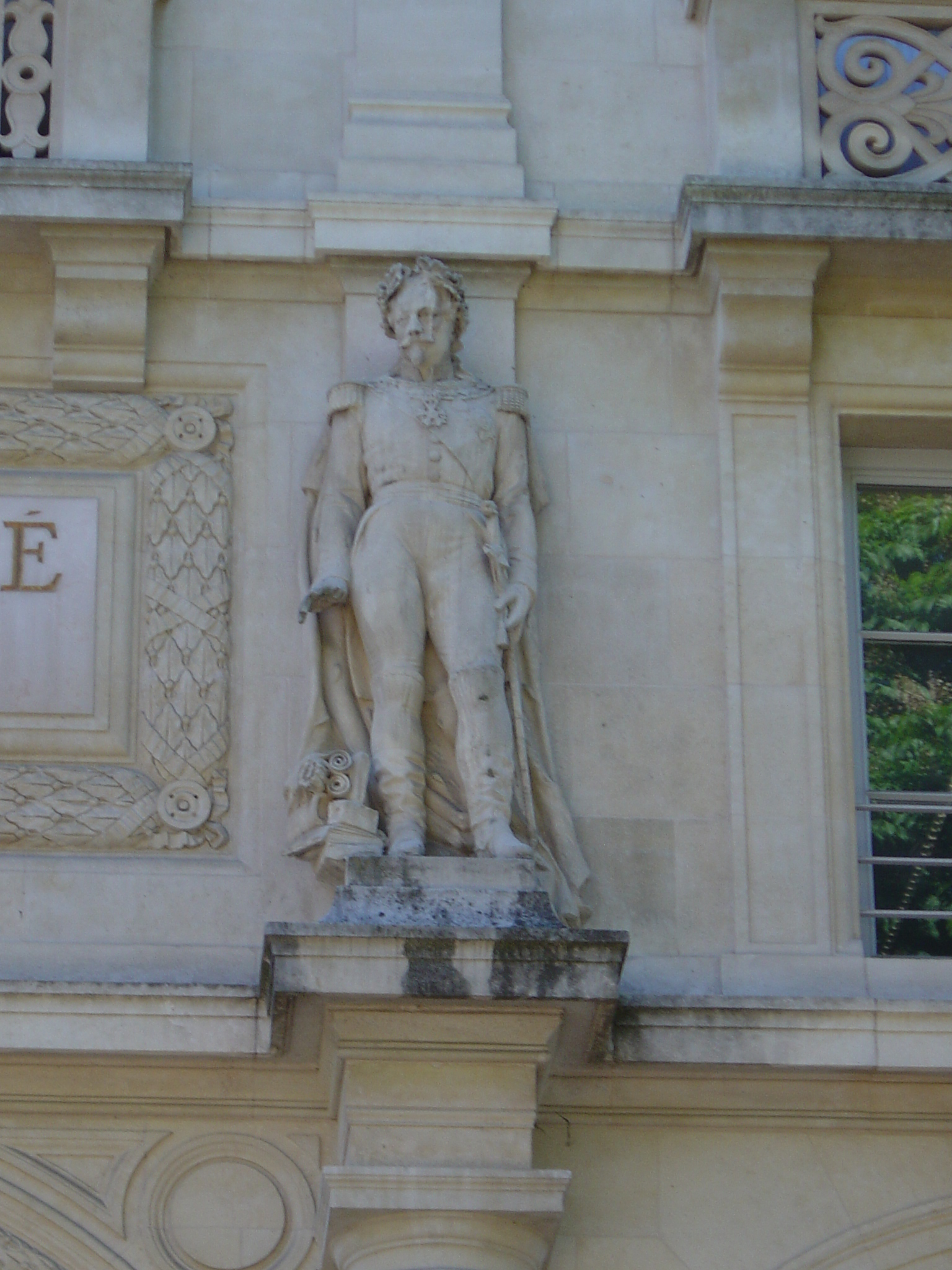 Façade du palais de l'Académie (aujourd'hui palais de l'Université), cours Léopold, Nancy. Statue de Napoléon III par Giorné Viard.